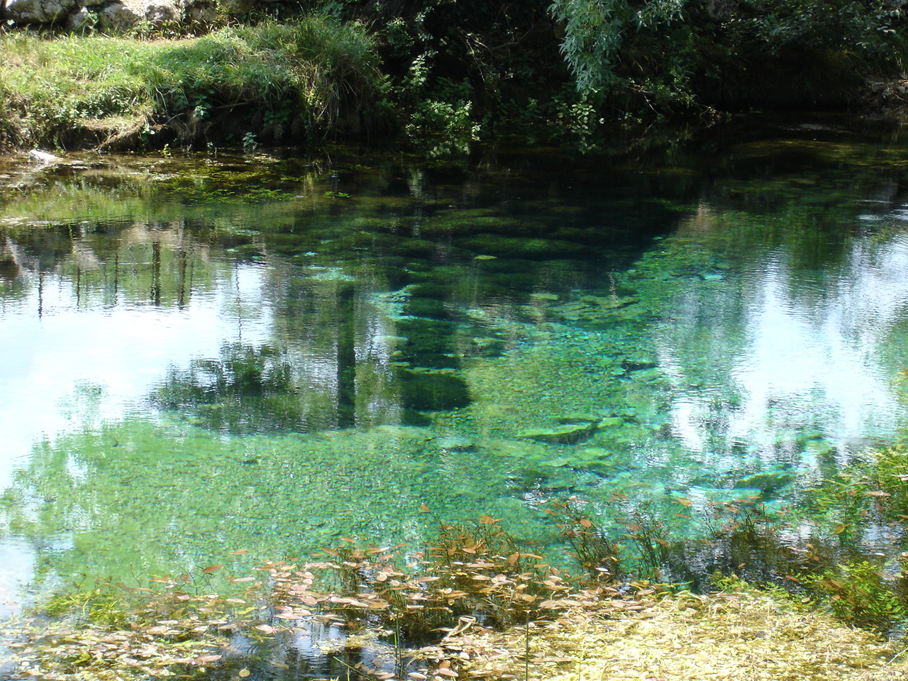 Sources de la Buèges (34 Hérault France)